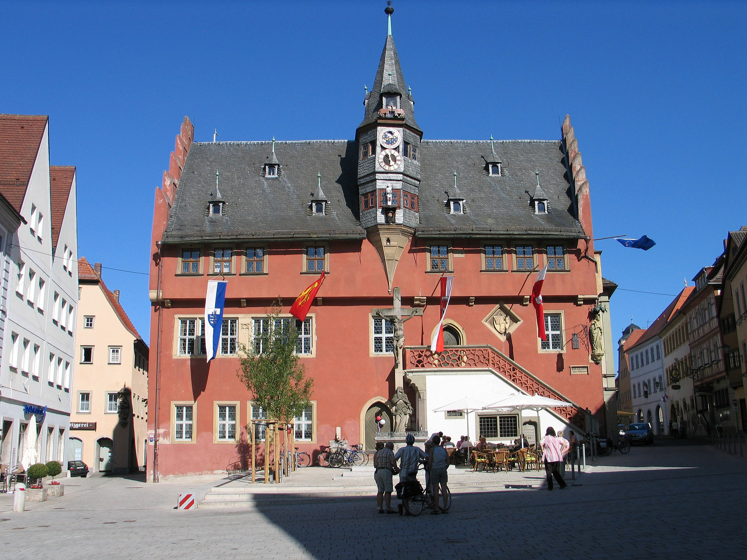 Ochsenfurt, Rathaus